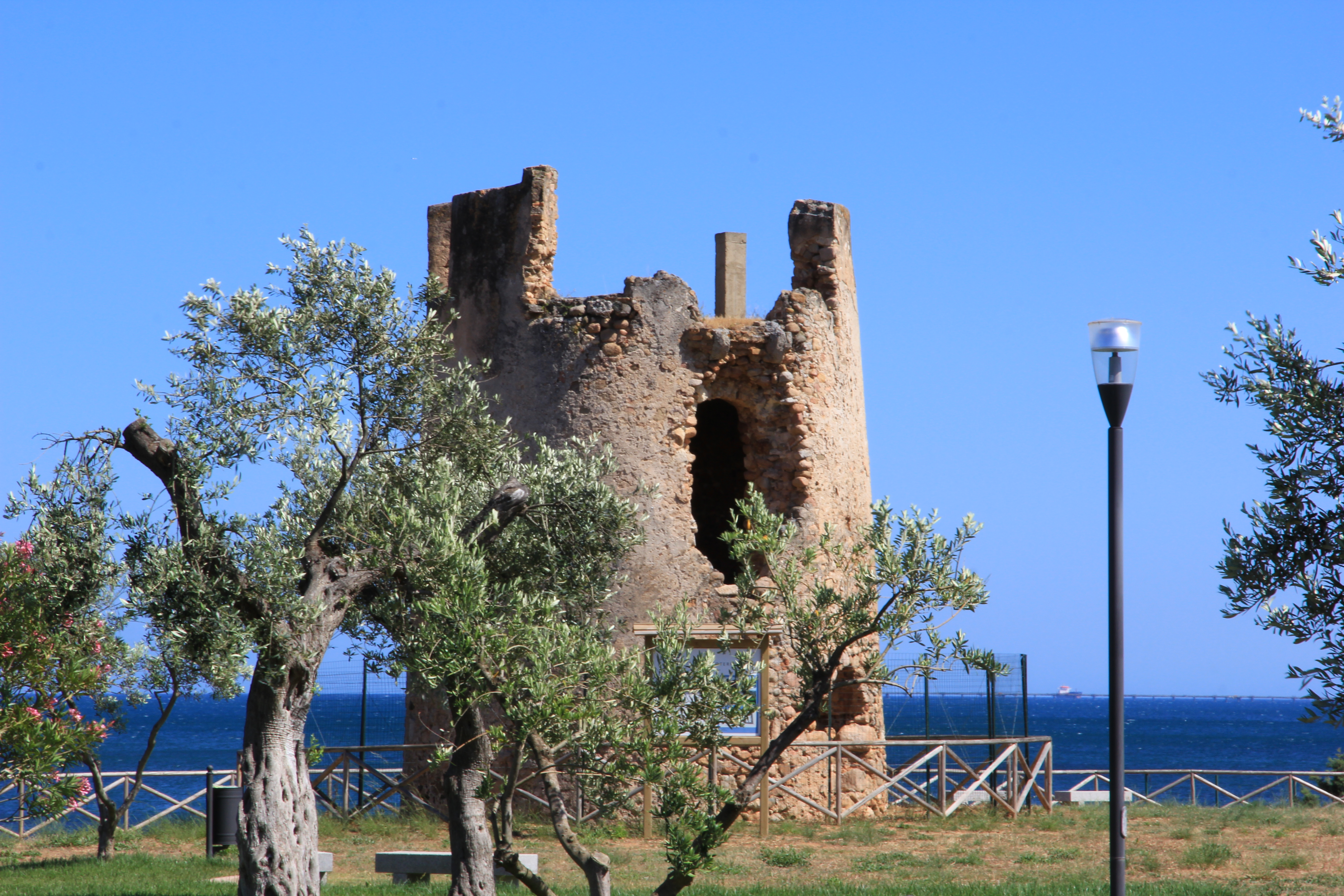 Capoterra - Torre di Su Loi